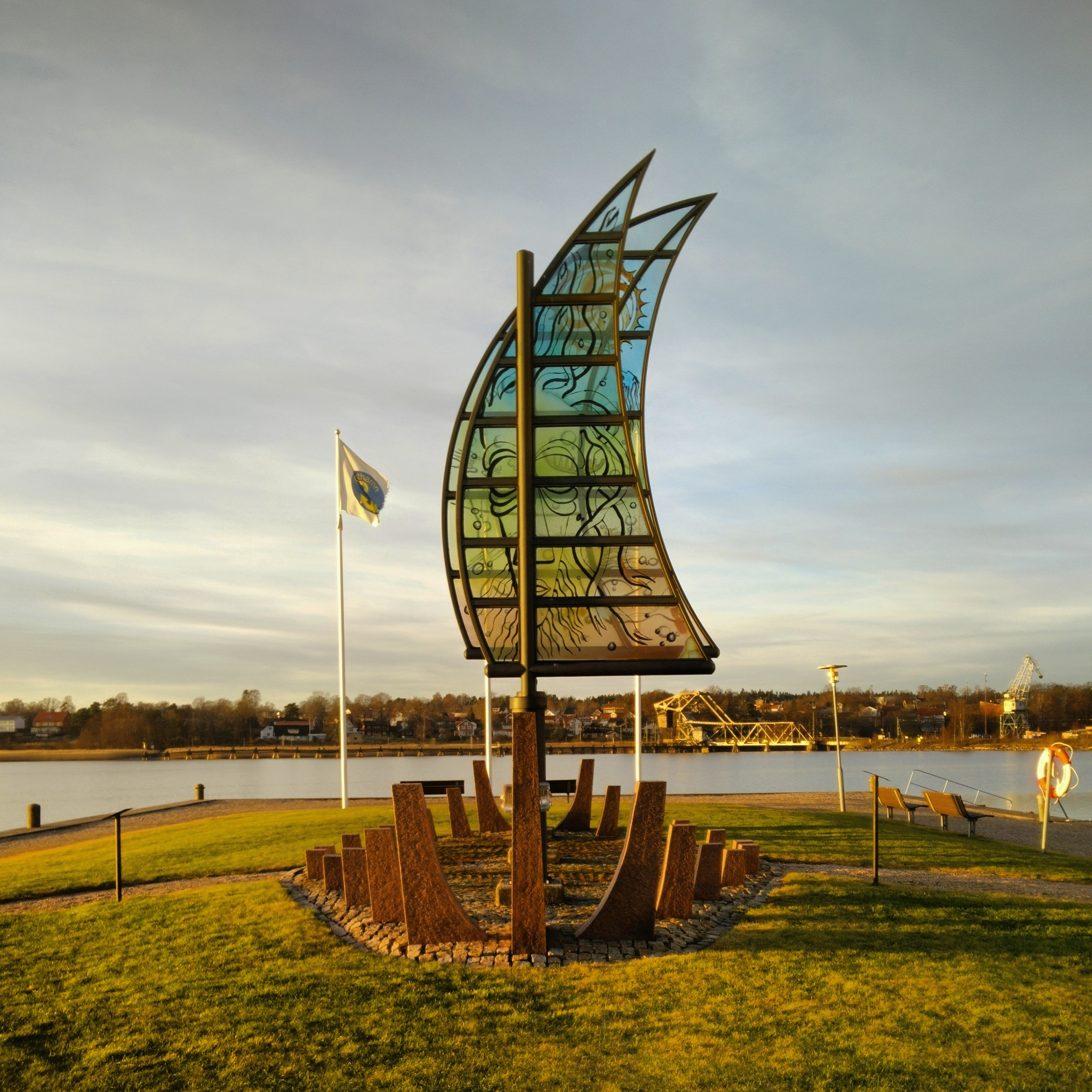 Andarnas skepp (konstnär: Kjell Engman, född 1946) i Vänerparken i Vänersborg. Invigd i samband med Vänersborgs 350-årsjubileum 1994.